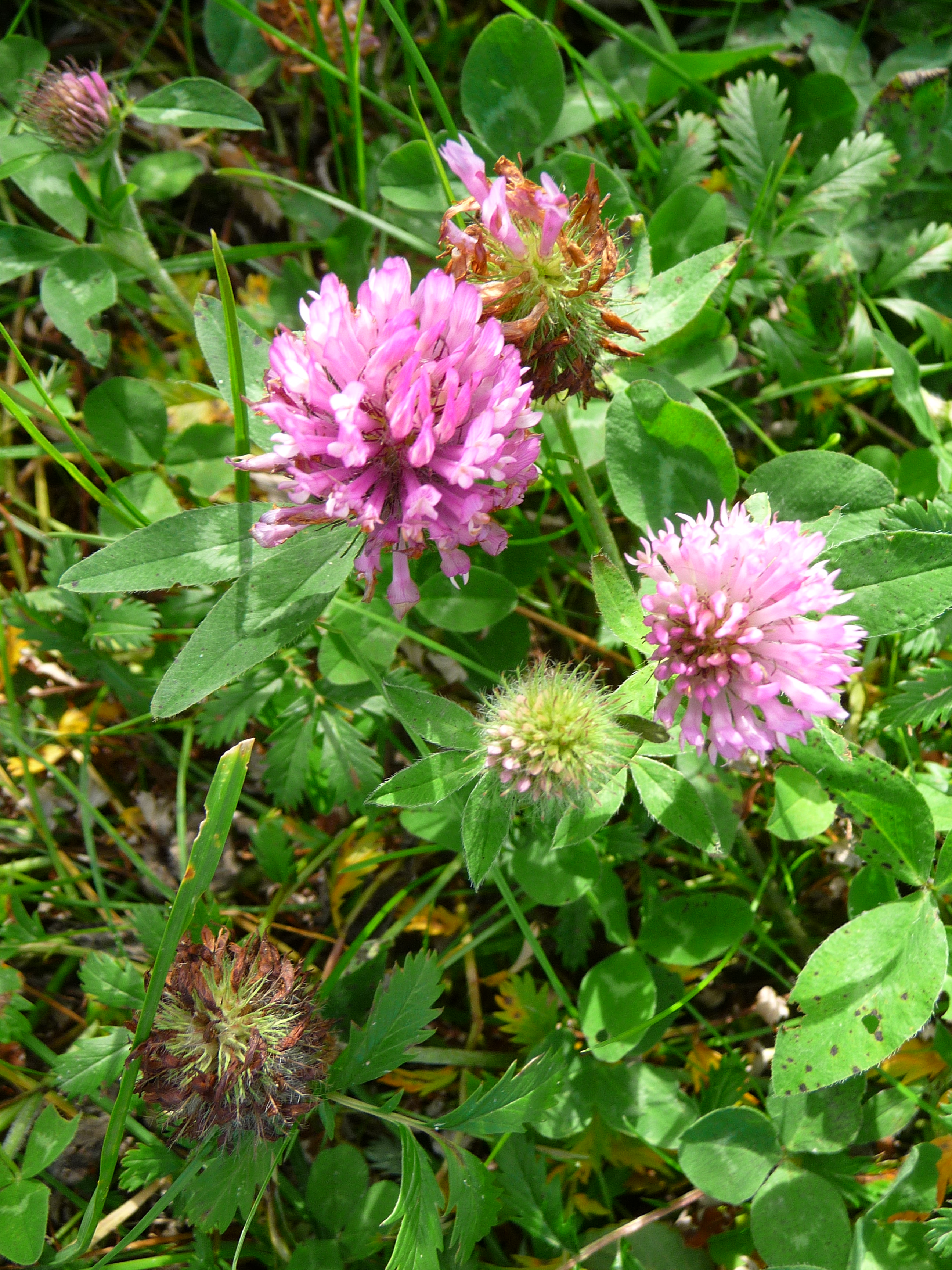 Rotklee (Trifolium pratense), fotografiert auf der ostfriesischen Nordseeinsel Juist (Niedersachsen, Deutschland)